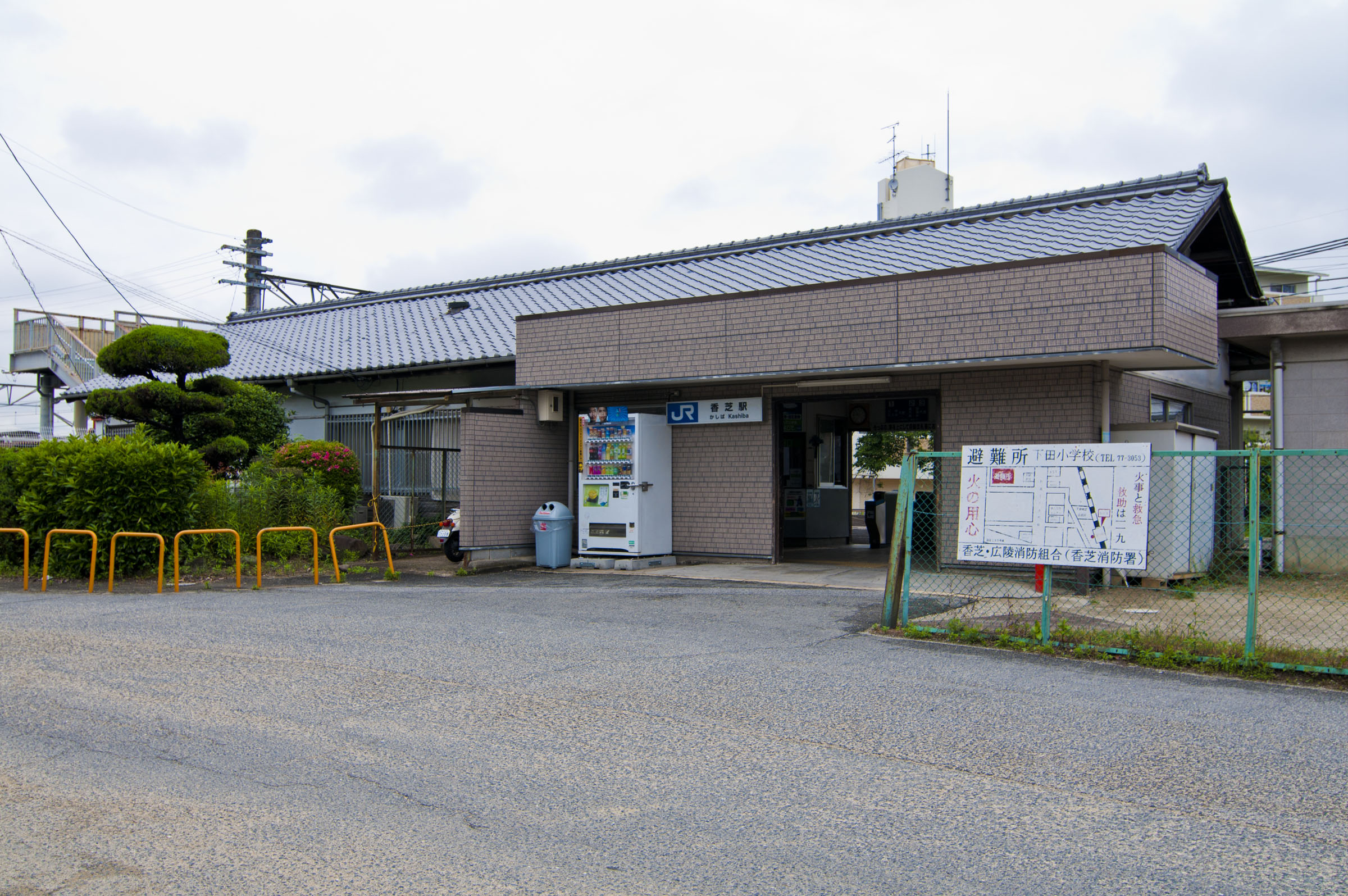 西日本旅客鉄道和歌山線香芝駅駅舎写真